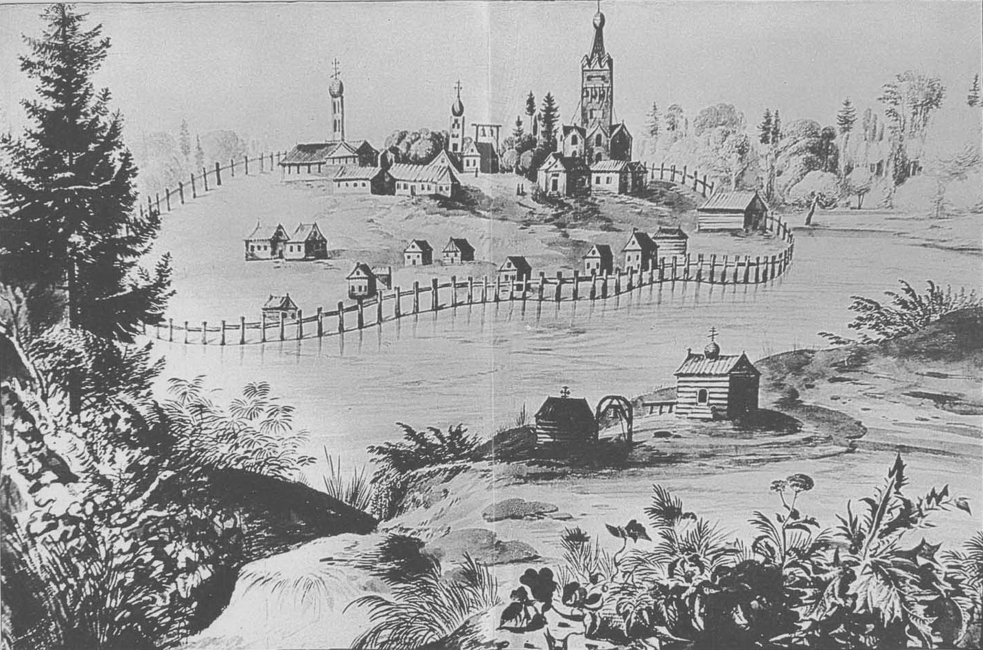 Снетогорский монастырь близ Пскова